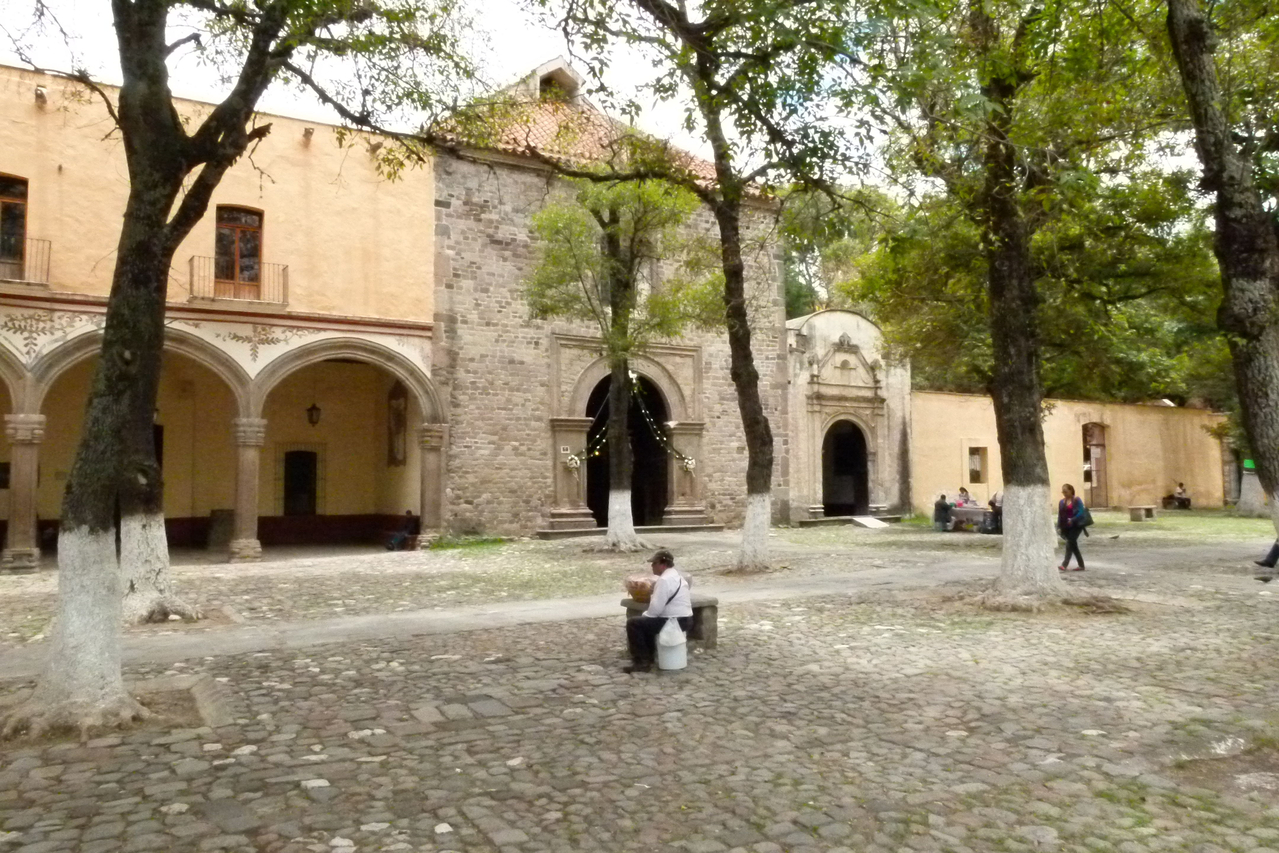 Templo y Ex Convento de San Francisco de la Asunción de Nuestra Señora